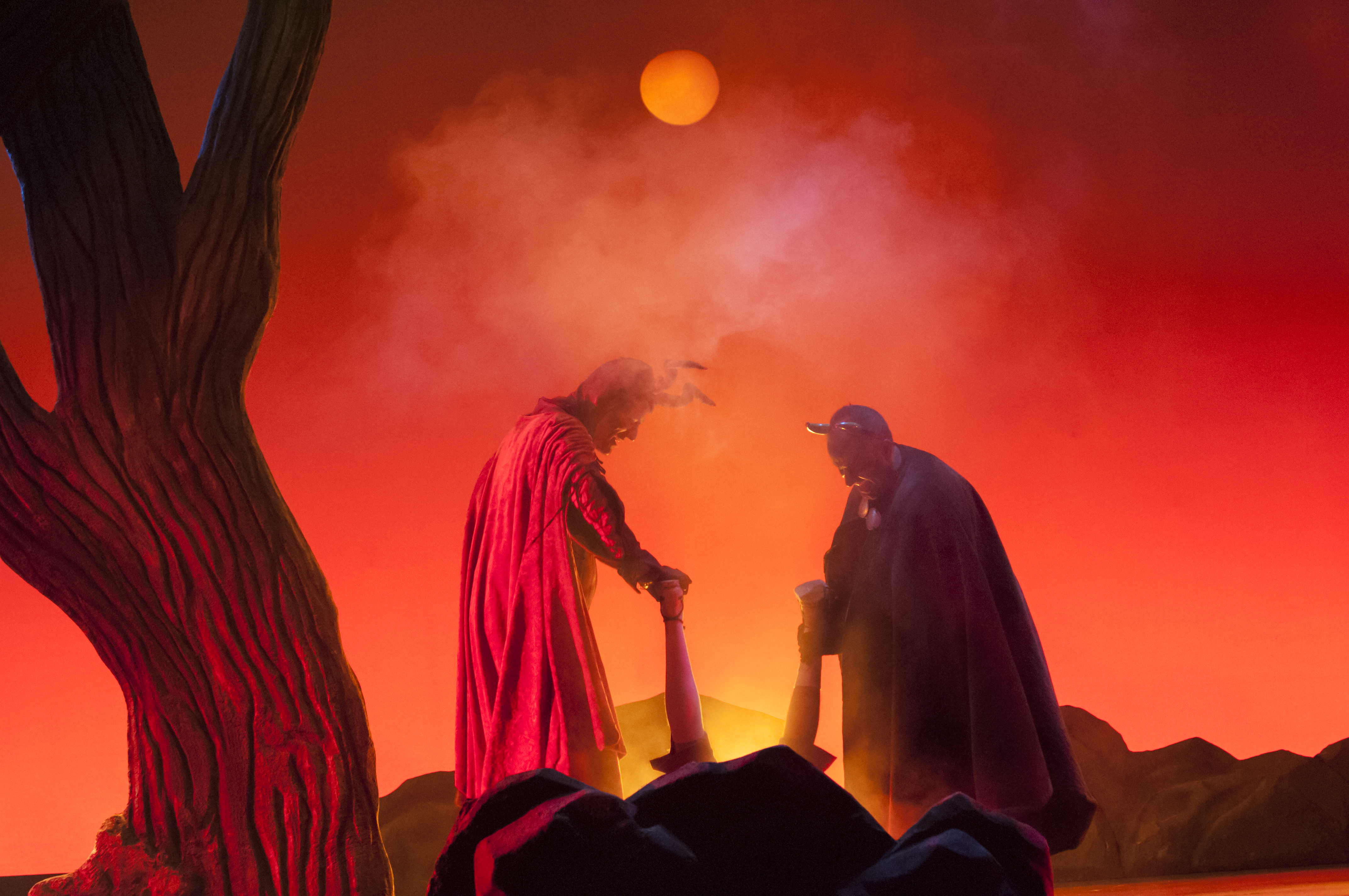 Quadre de l'engany.